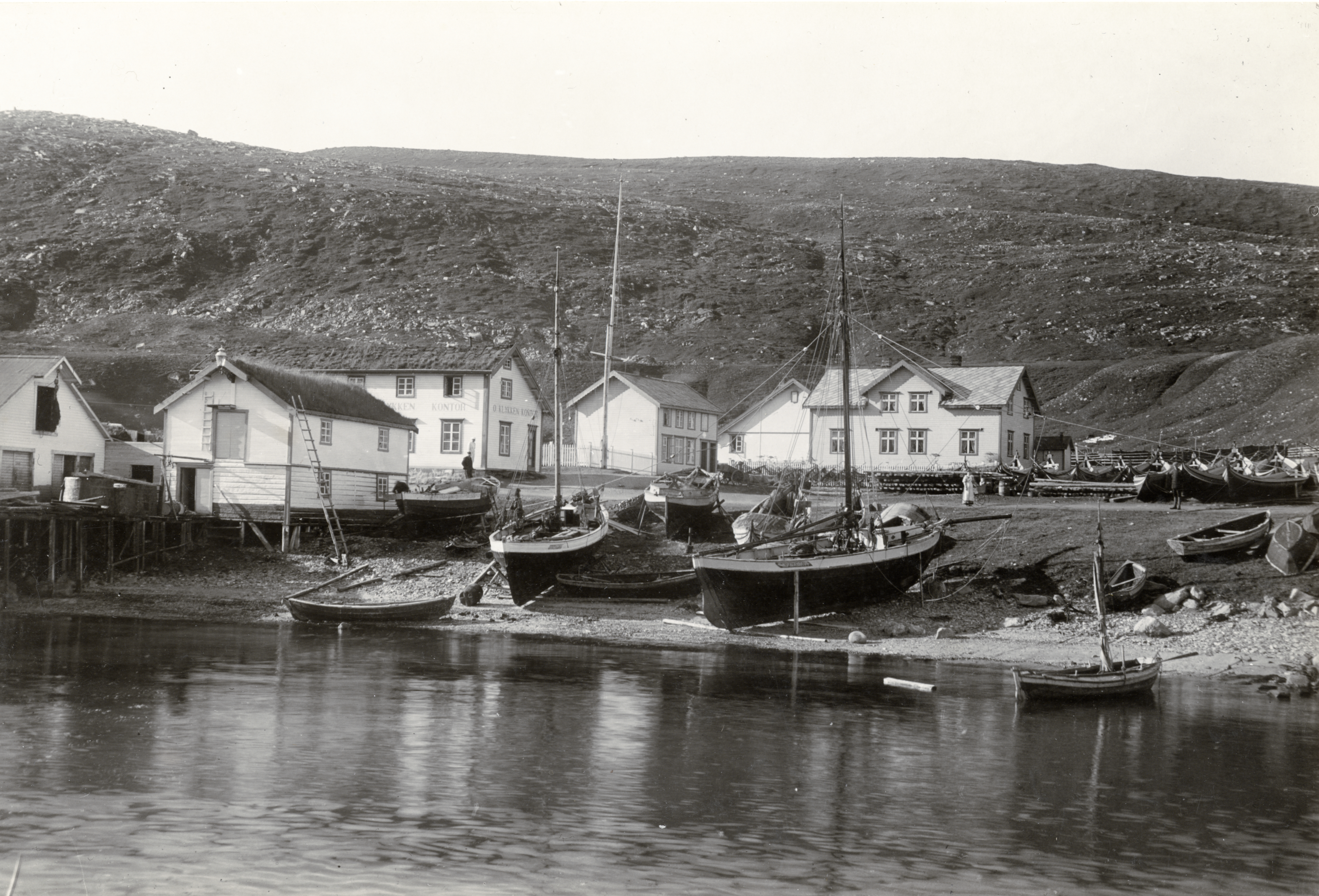 Skjøtingberg, Skjøtningberg i Lebesby, Finnmark This image on crowdsourcing geotagging platform Fotodugnad